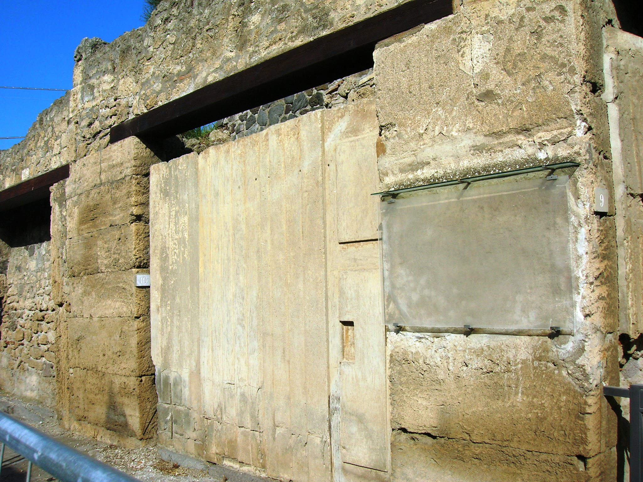 Bottega